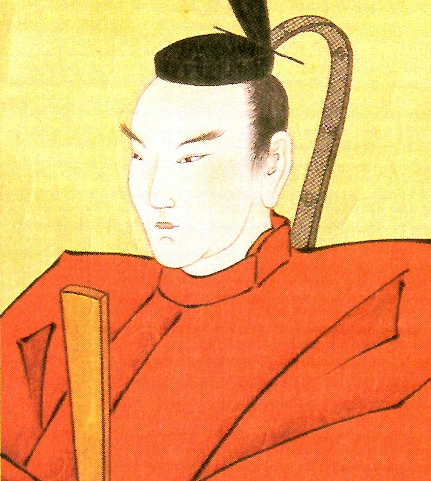 遠山友由の肖像。